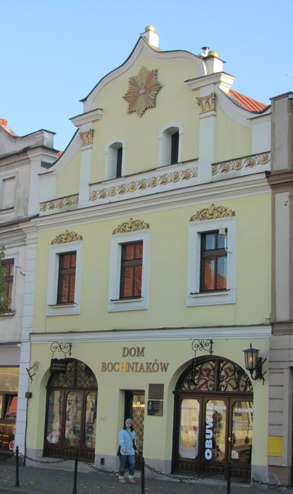 Bochnia, Rynek 2 - dawna waga miejska ("Dom Bochniaków"), obecnie dom mieszkalny, XVII w. (zabytek nr A-232)